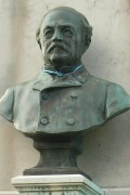 buste